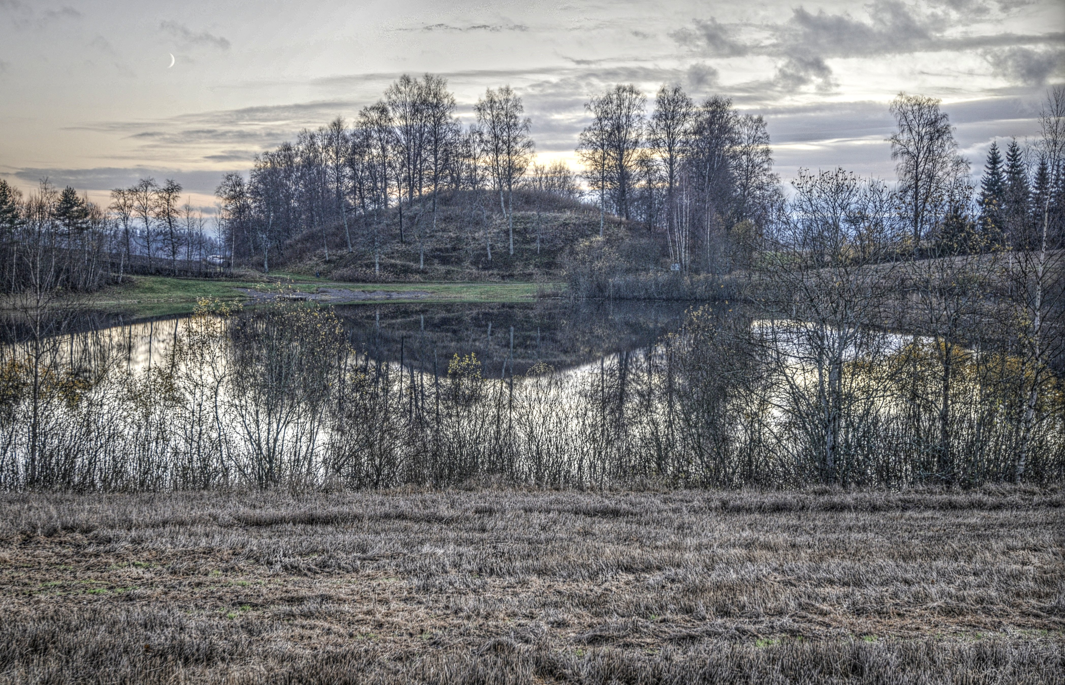 Raknehaugen gravhaug på Ljøgot, en av Nord-Europas største gravhauger